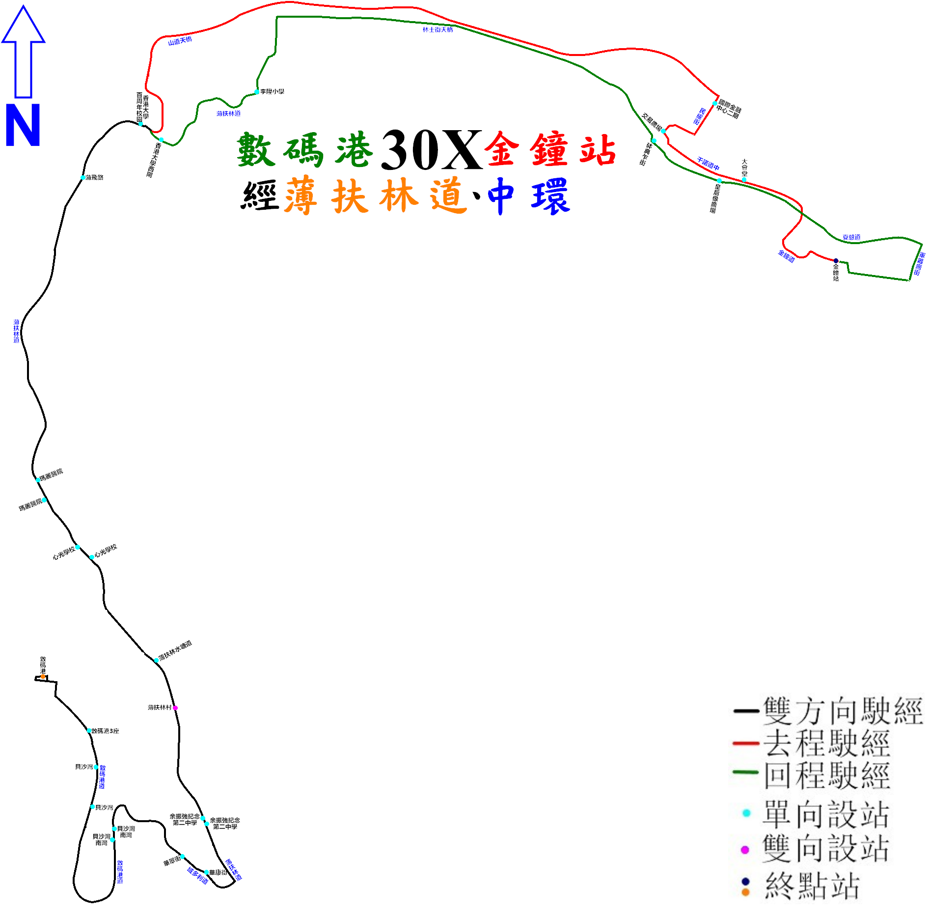 中文（香港）: 新巴30X線的走線圖